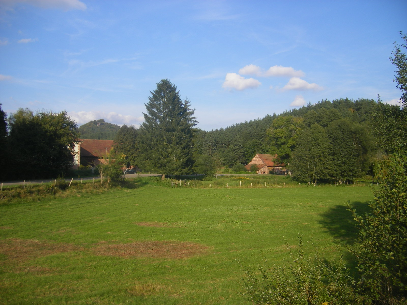 Landscape between Bannstein and Philippsbourg